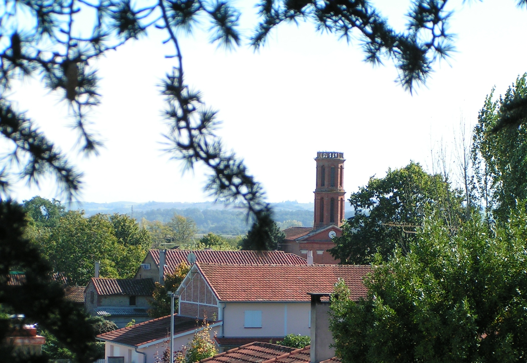 Lafitte-Vigorbane Catégorie: Image GFDL